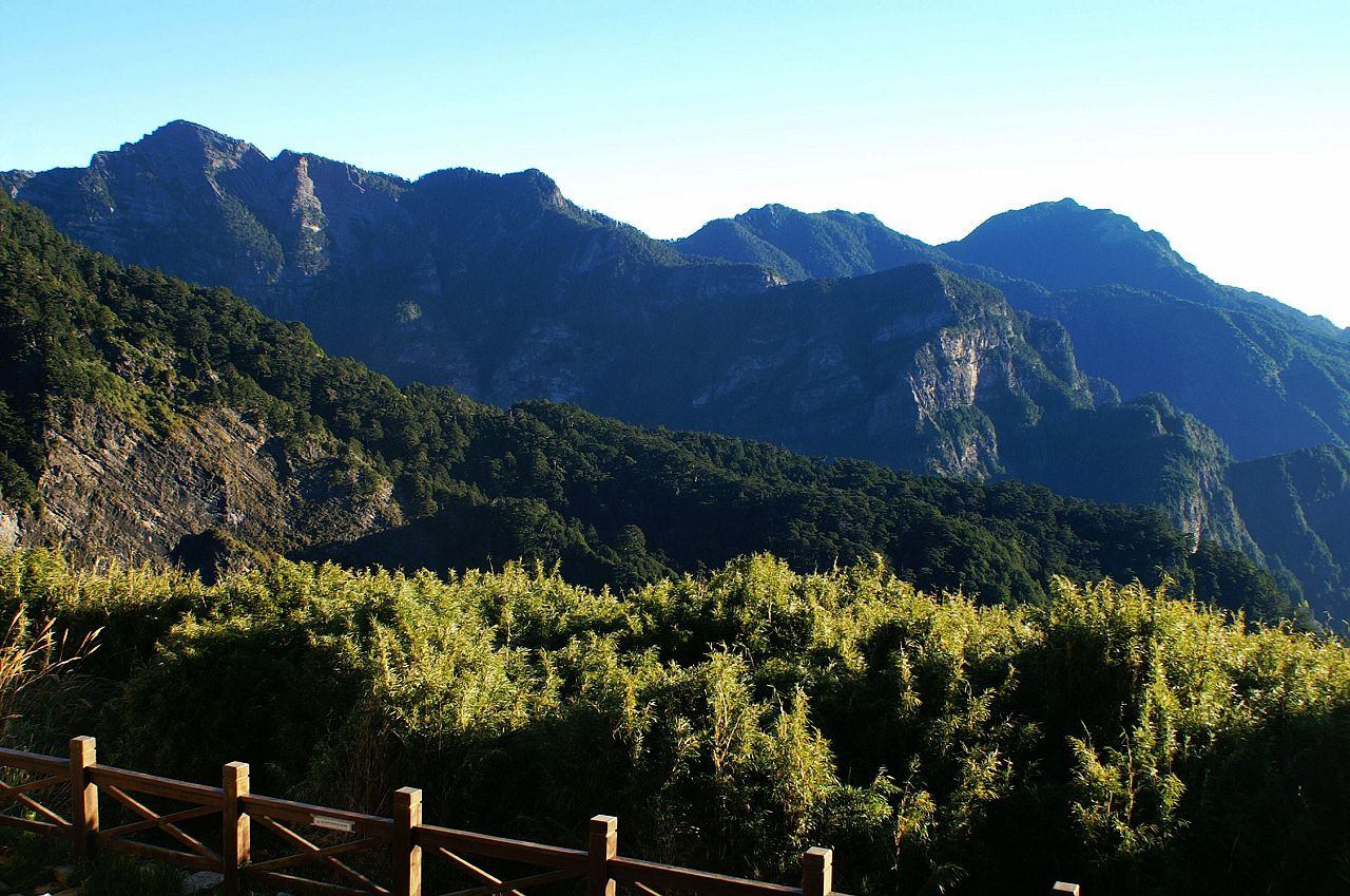 武陵四秀Bân-lâm-gú: Bú-lîng sì siù